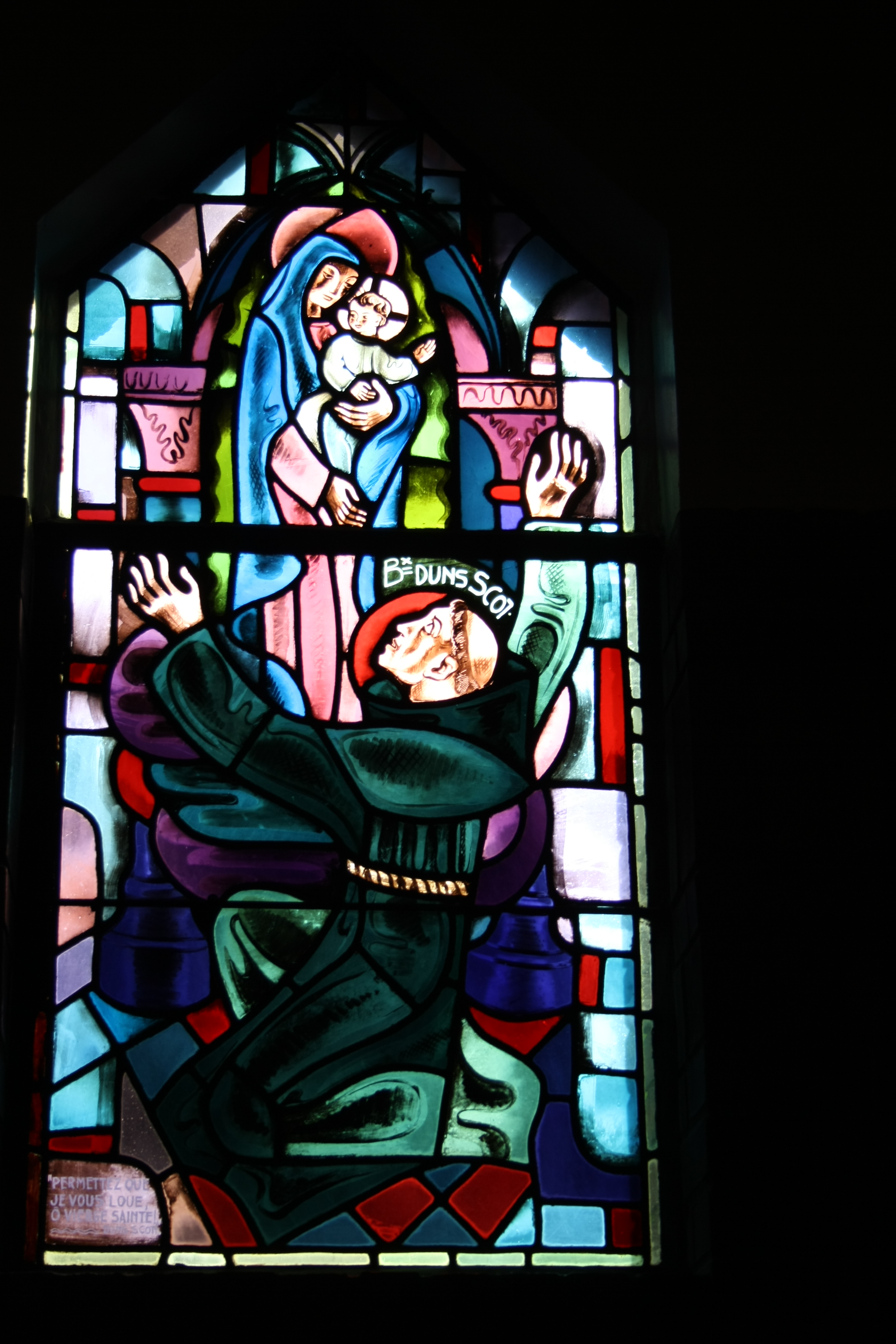 Bleiglasfenster in der Kapelle (Seitenschiff) des Couvent des Franciscains in Paris (7, rue Marie-Rose im 14. arrondissement), Darstellung: Johannes Duns Scotus